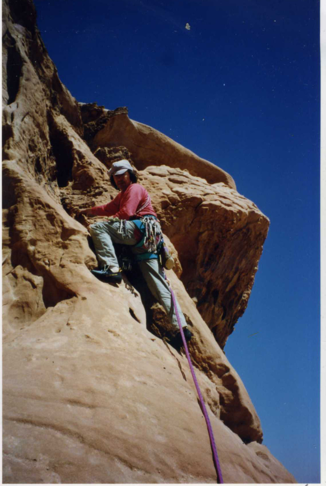 Jacques Ramouillet sur le Jebel Burdah - Wadi Rum - Jordanie